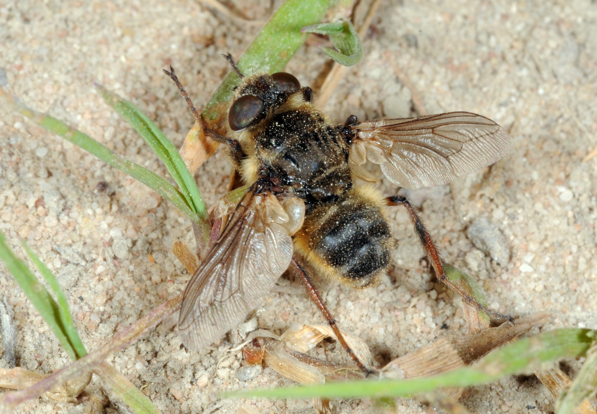 Oestridae: Hypodermatinae: Hypoderma spec., Standortübungsplatz Speyer / Dudenhofen, Rheinland-Pfalz, Deutschland